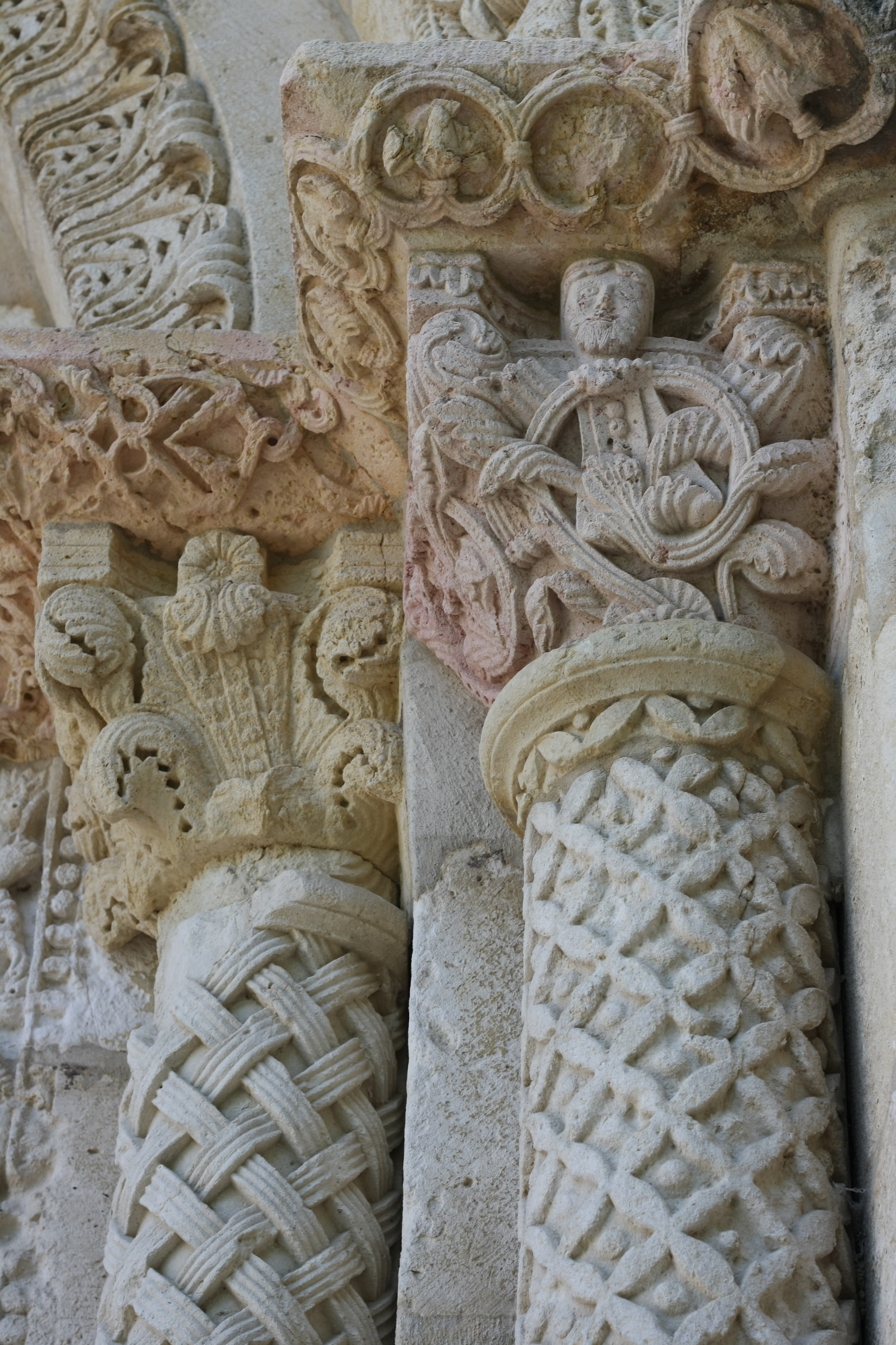 Romanische Klosterkirche Nuestra Señora de Estíbaliz, Südportal Porta Speciosa, Säulen mit Flechtband und Kapitellen